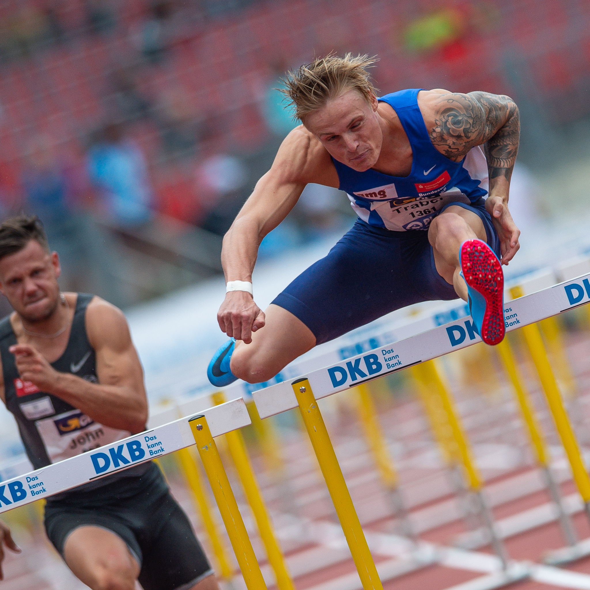 110-Meter-Hürdenlauf,DLV,Deutsche Leichtathletik Meisterschaften 2018,Deutscher Leichtathletik-Verband,Gregor Traber,LAV Stadtwerke Tübingen,Max-Morlock-Stadion